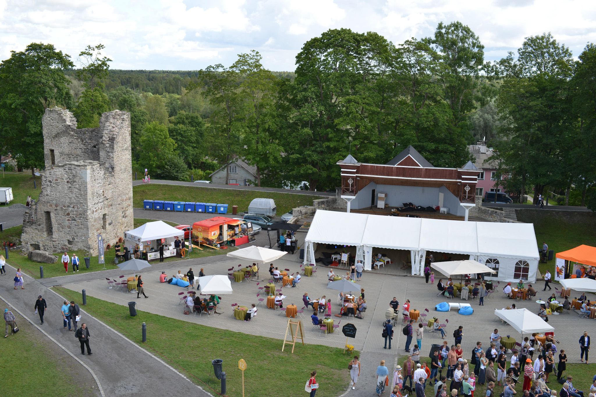 Arvamusfestival 2014